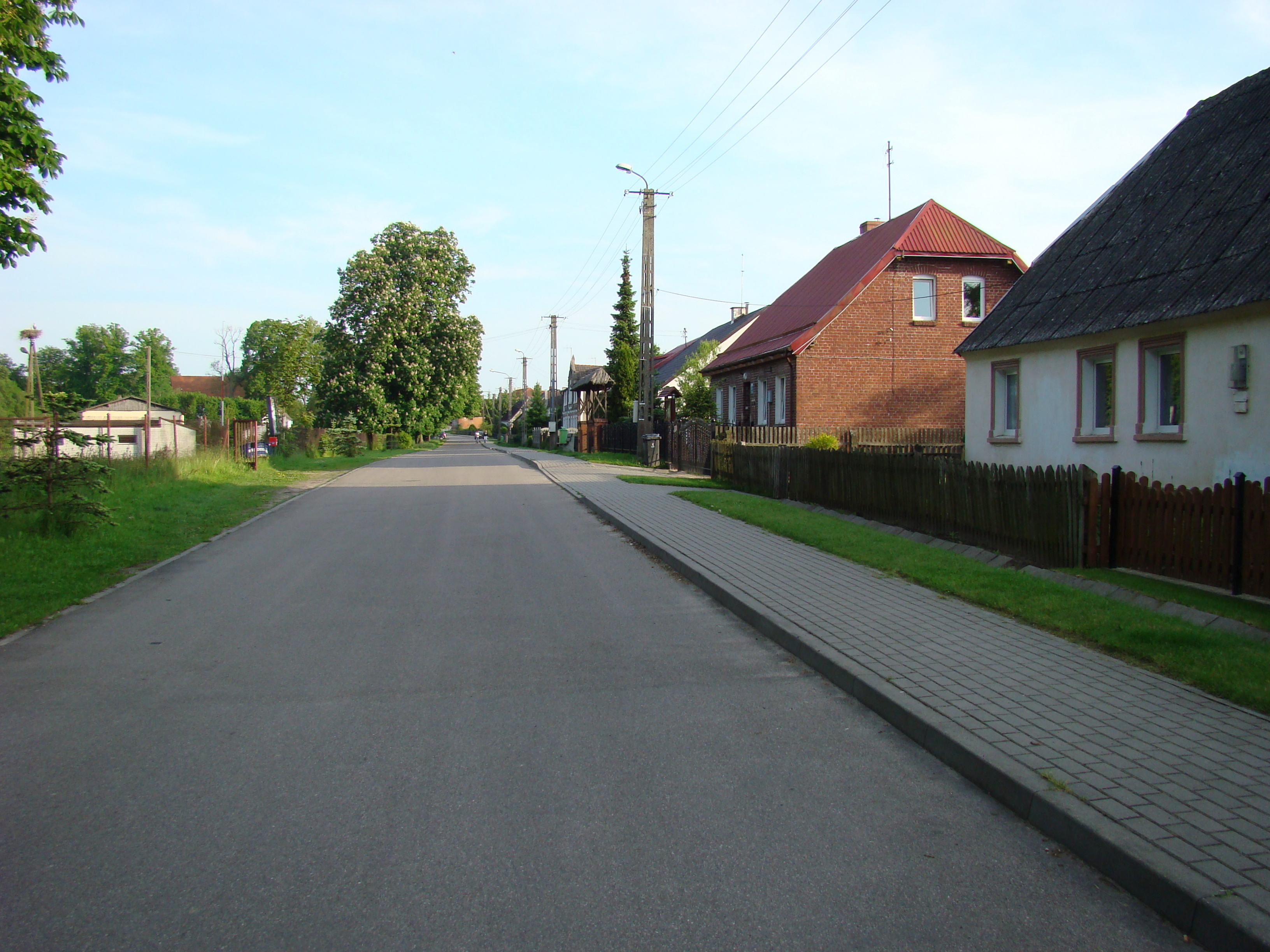 Droga przez Rusowio.